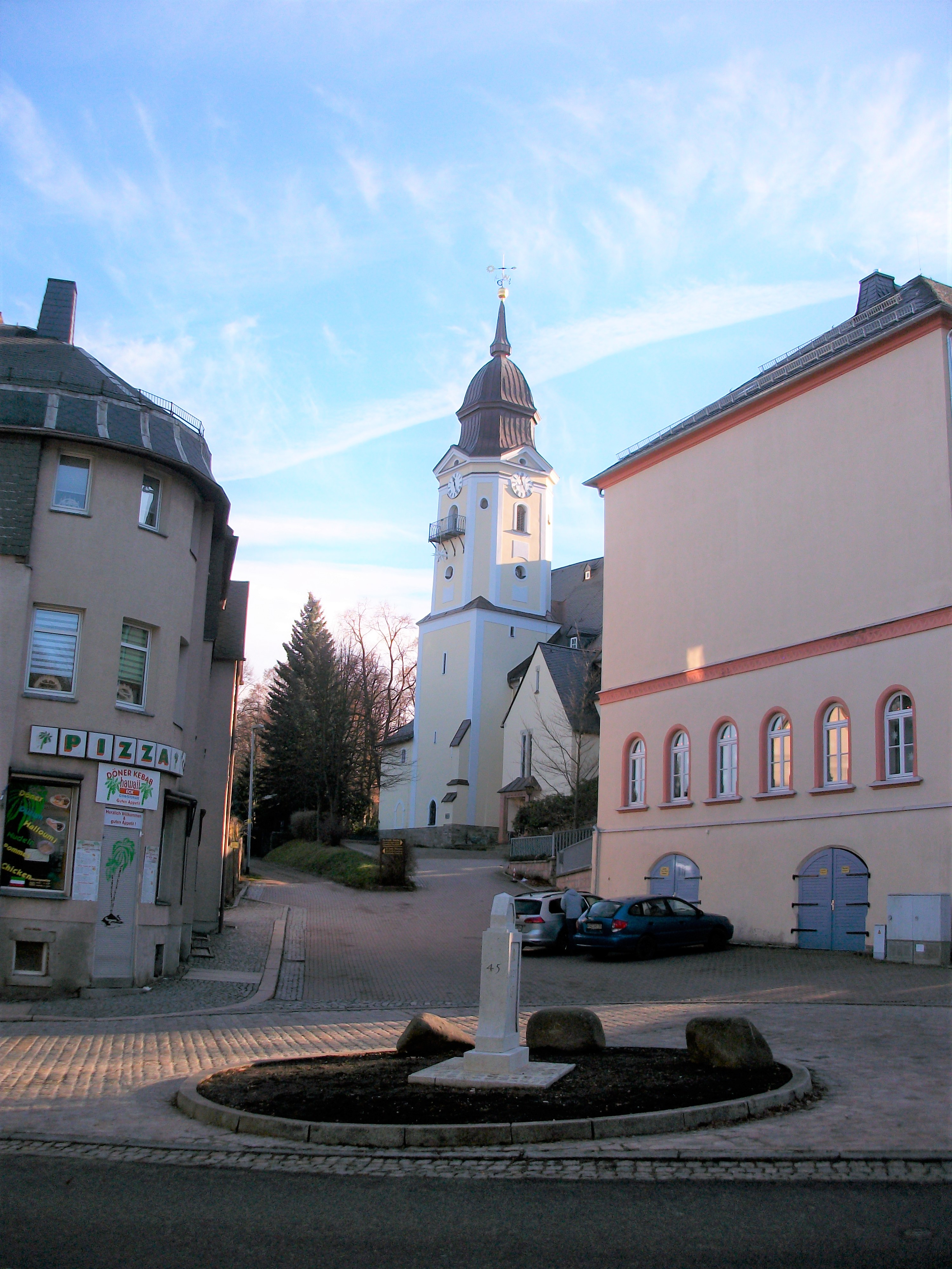 Viertelmeilenstein Neustädtel und Kirche